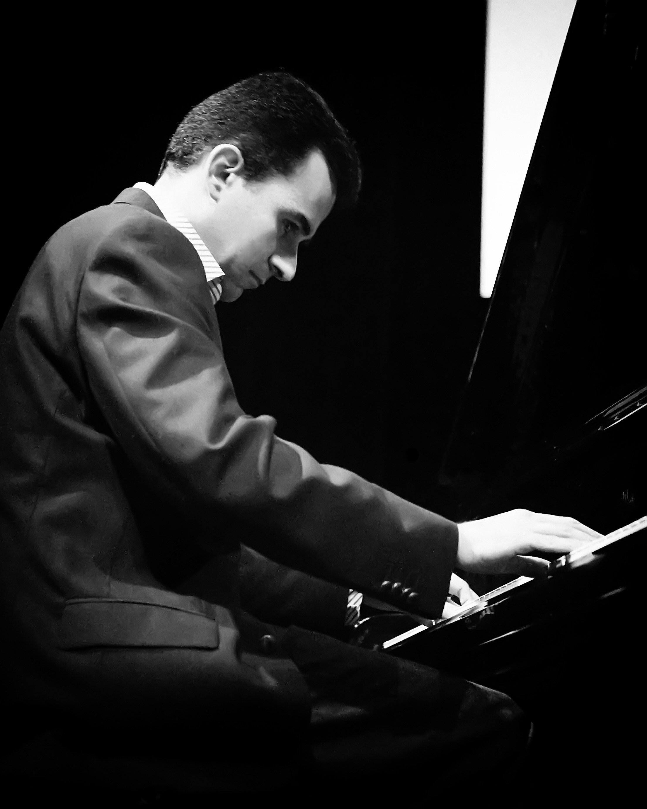 Pejman Akbarzadeh پژمان اکبرزاده , Persian (Iranian) pianist and journalist. He is a producer at Radio Zamaneh in Amsterdam.